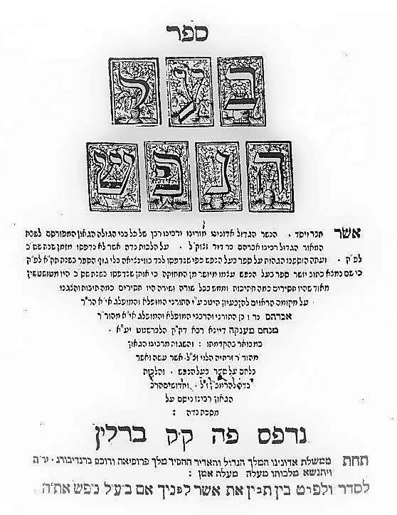 צילום שער הספר 'בעל הנפש' של הראב"ד, דפוס ברלין, שנת תקכב